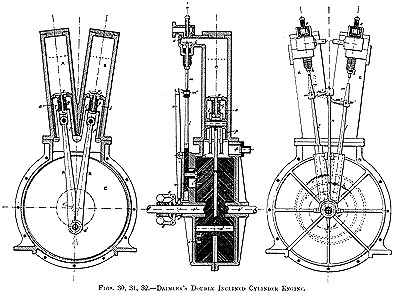 Daimler's double inclined cylinder engine installed in Panhard & Levassor 1894